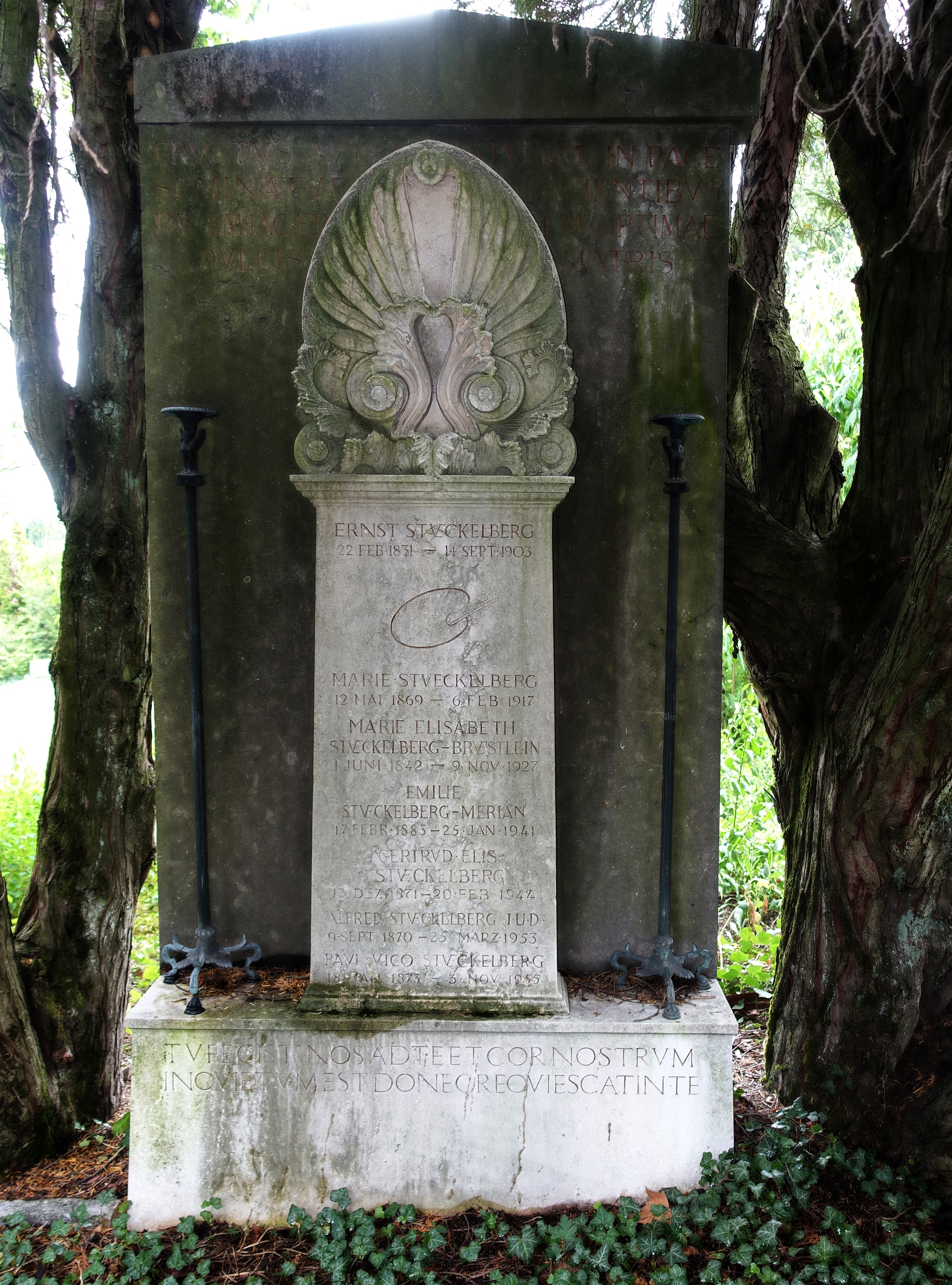 Ernst Stückelberg (1831-1903) Kunstmaler. Familien Grab auf dem Friedhof Wolfgottesacker, Basel